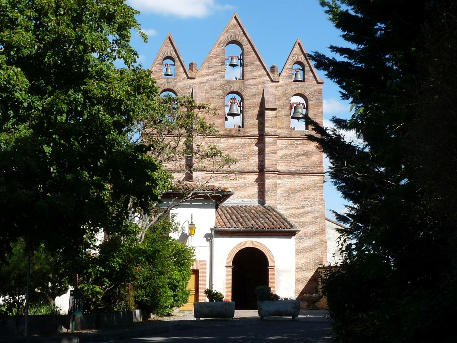 Eglise de Goyrans, Haute-Garonne, France